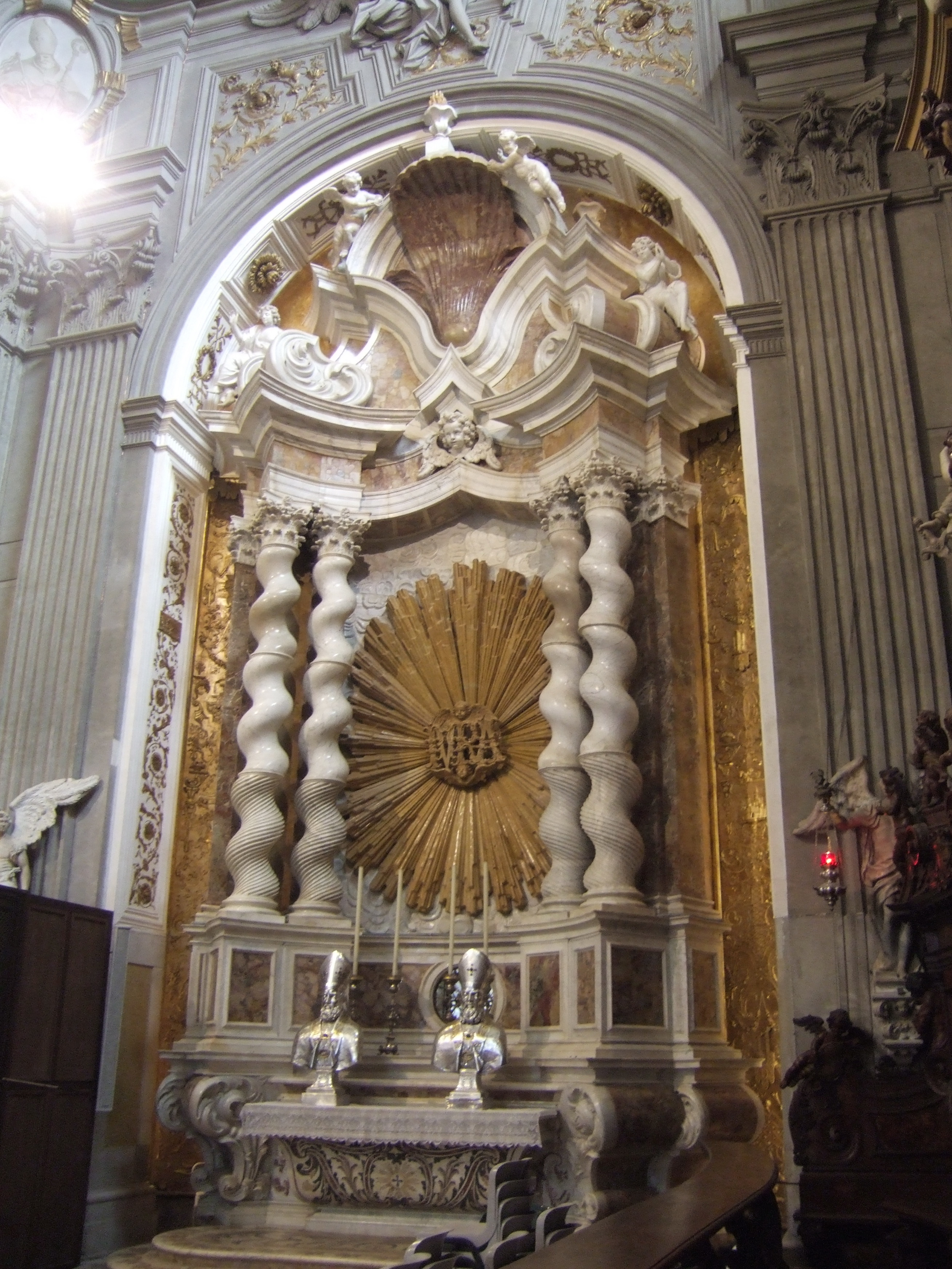 Duomo di Udine - Presbiterio - Altare del Nome di Maria